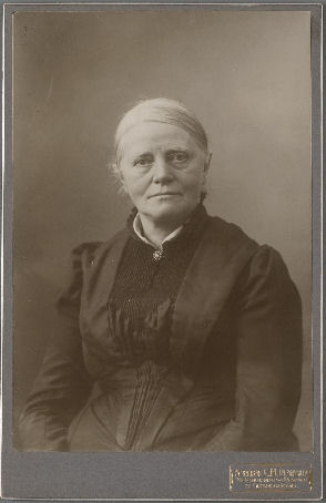 Kunstenares Sientje Mesdag-van Houten